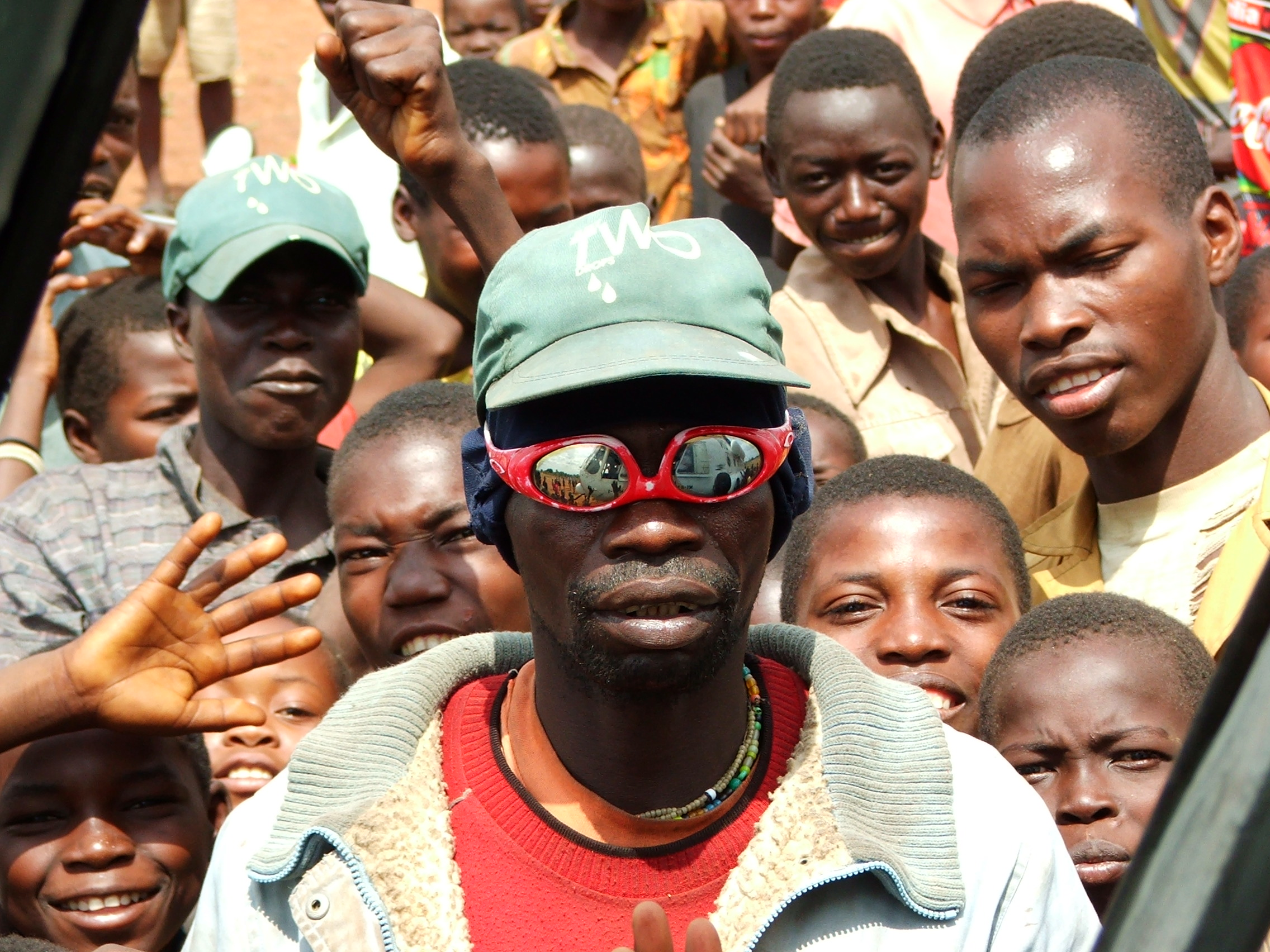 Местное население встречает вертолет